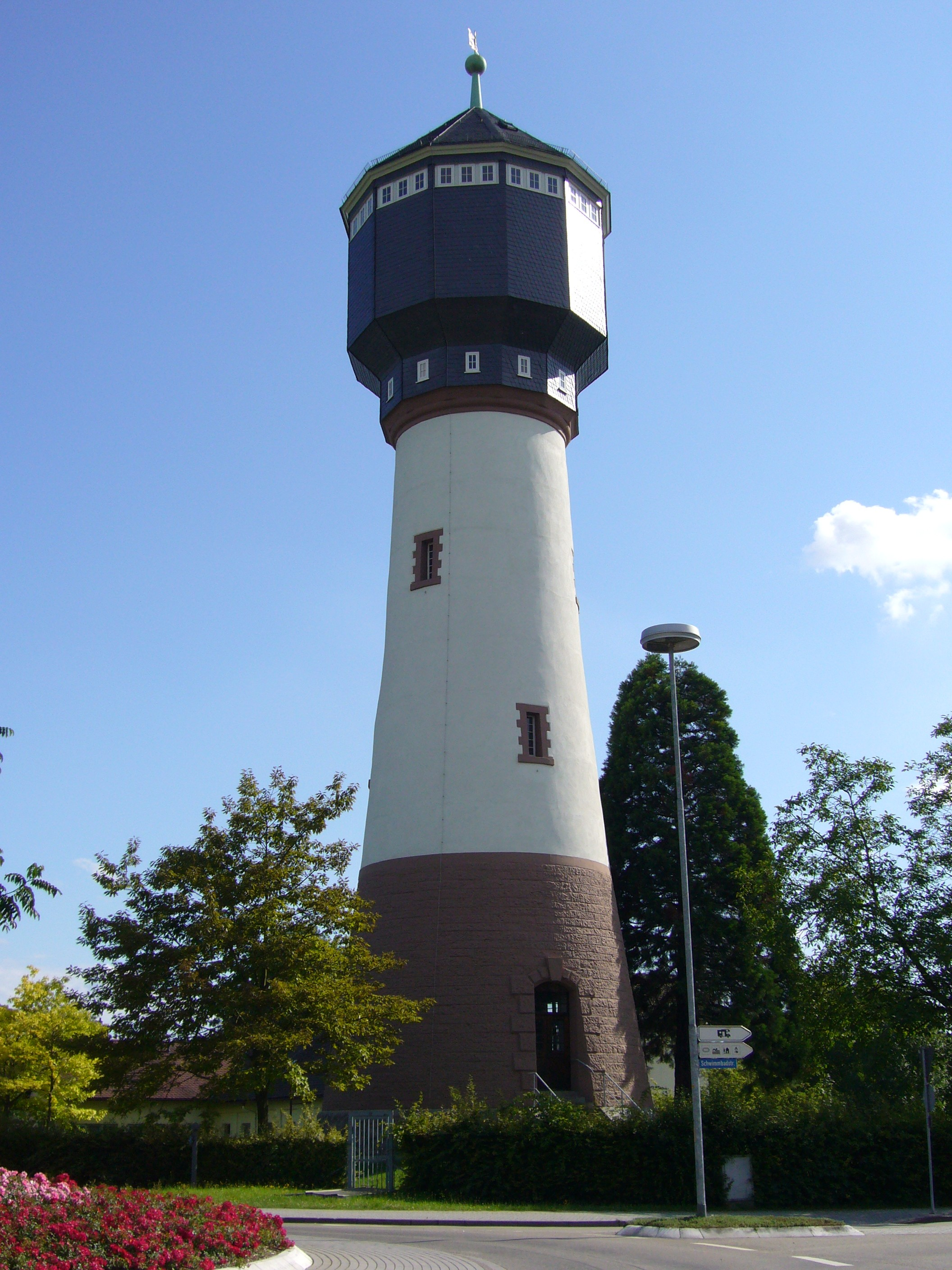 Château d'eau sur la route du quartier Kronenhof à Kehl